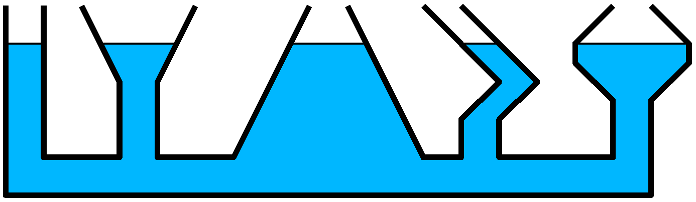 Hydrostatisches Paradoxon Kommunizierende Roehren